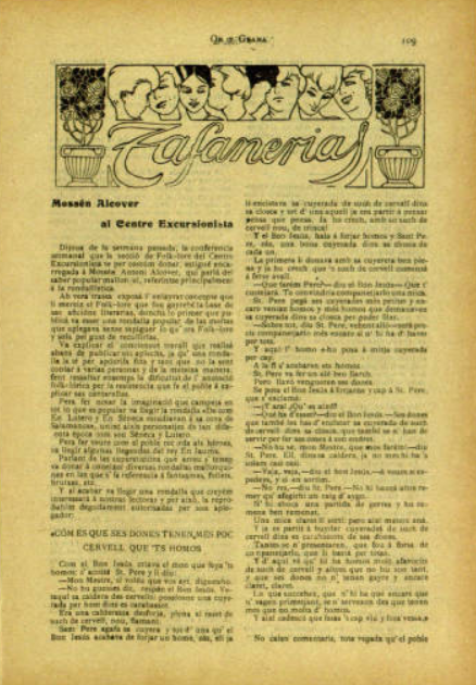 pàgina de tafanerias d'or y grana